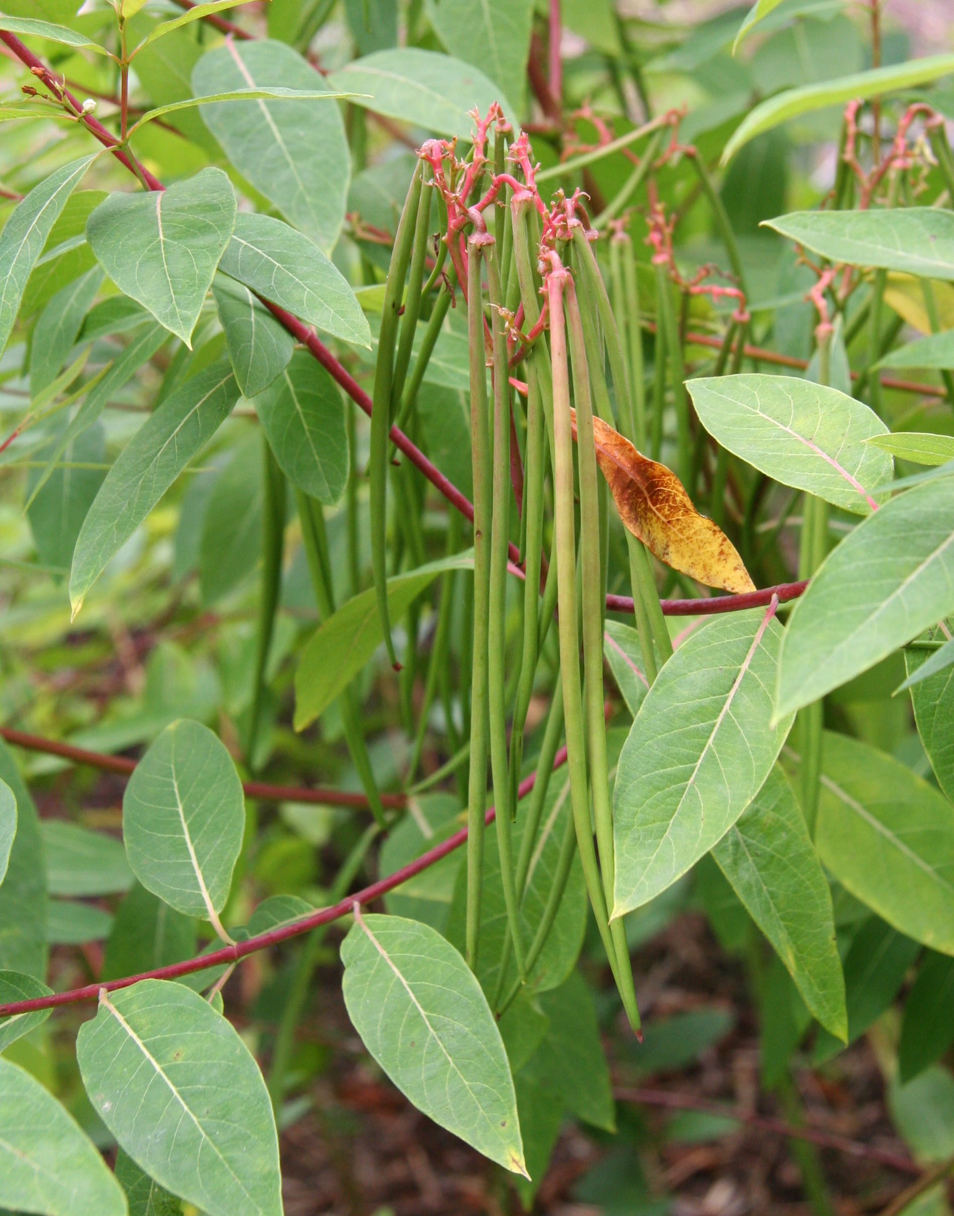 Früchte an Apocynum cannabinum im Botanischen Garten Dresden